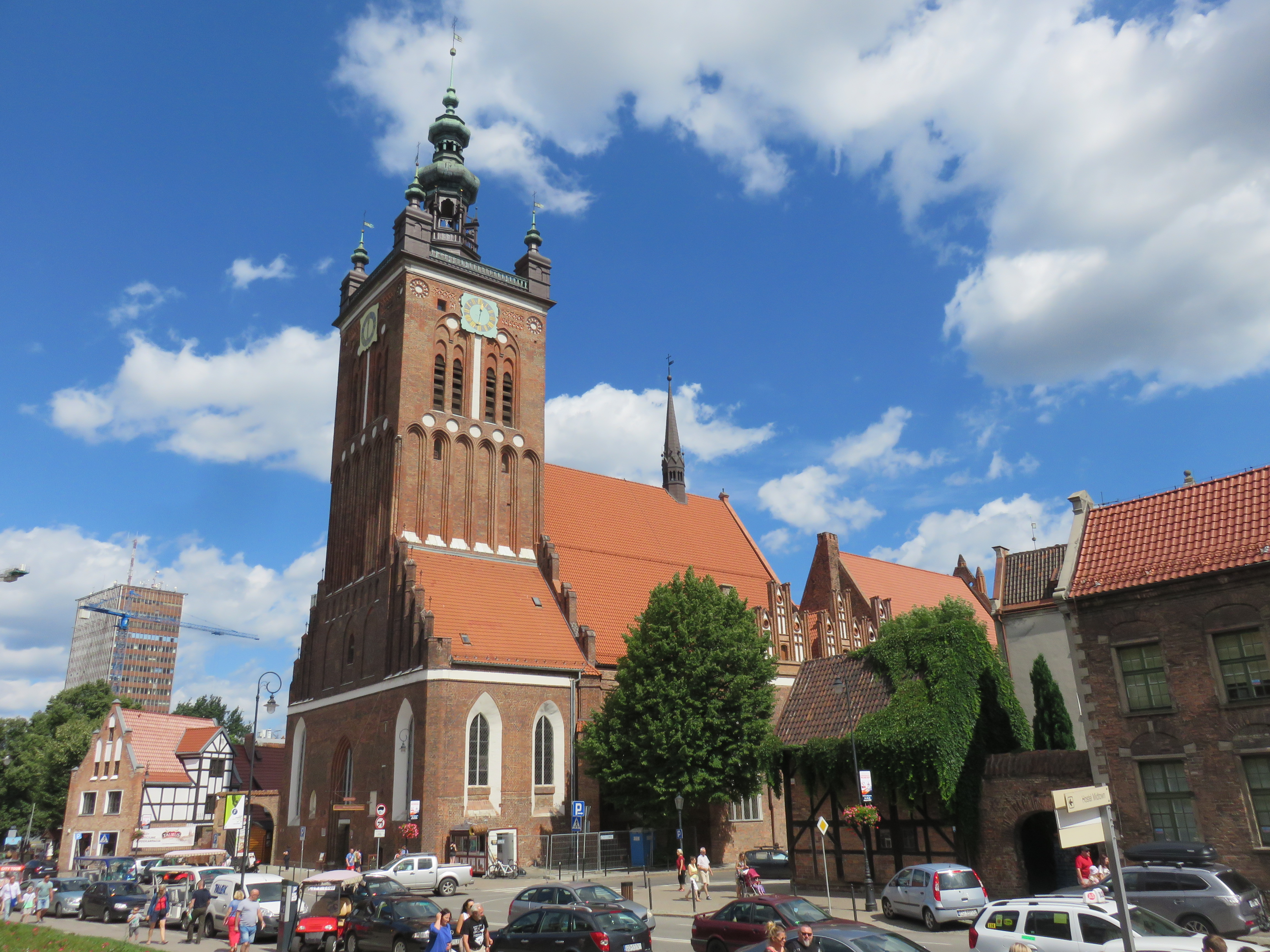 Katharinenkirche in Danzig